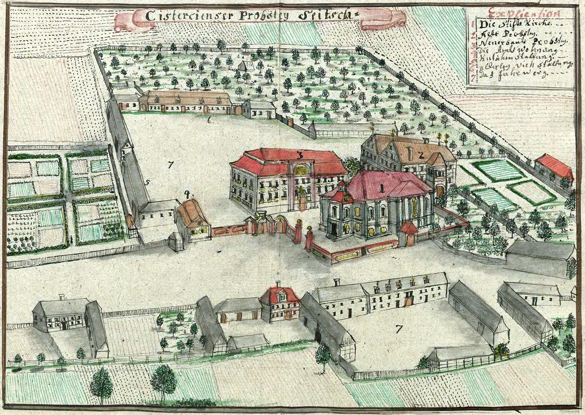 “Cistercienser Probstey Seitsch. Explication 1 Die Stifts Kirche. 2 Alte Probstey. 3 Neuerbaute Probstey. 4 Die Amtswohnung. 5 Kulühen (?) stallung. 6 allerley vieh stallung. 7 Das fuhrwerg.” Cistercian Propstei in Seitsch (today Siciny, Poland).